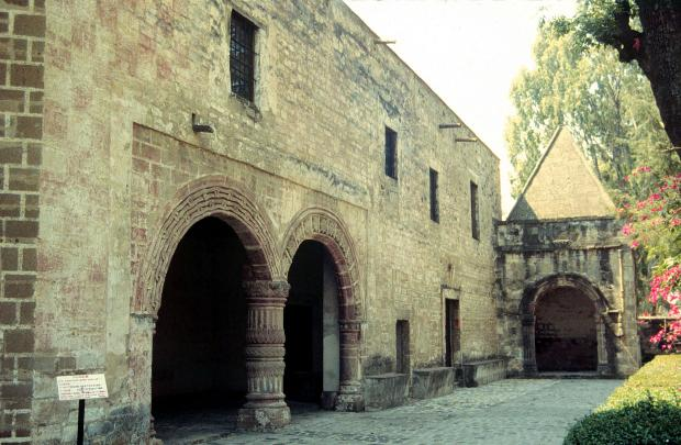 Detalle de la Porteria de ingreso al convento, asi como la capilla posa.